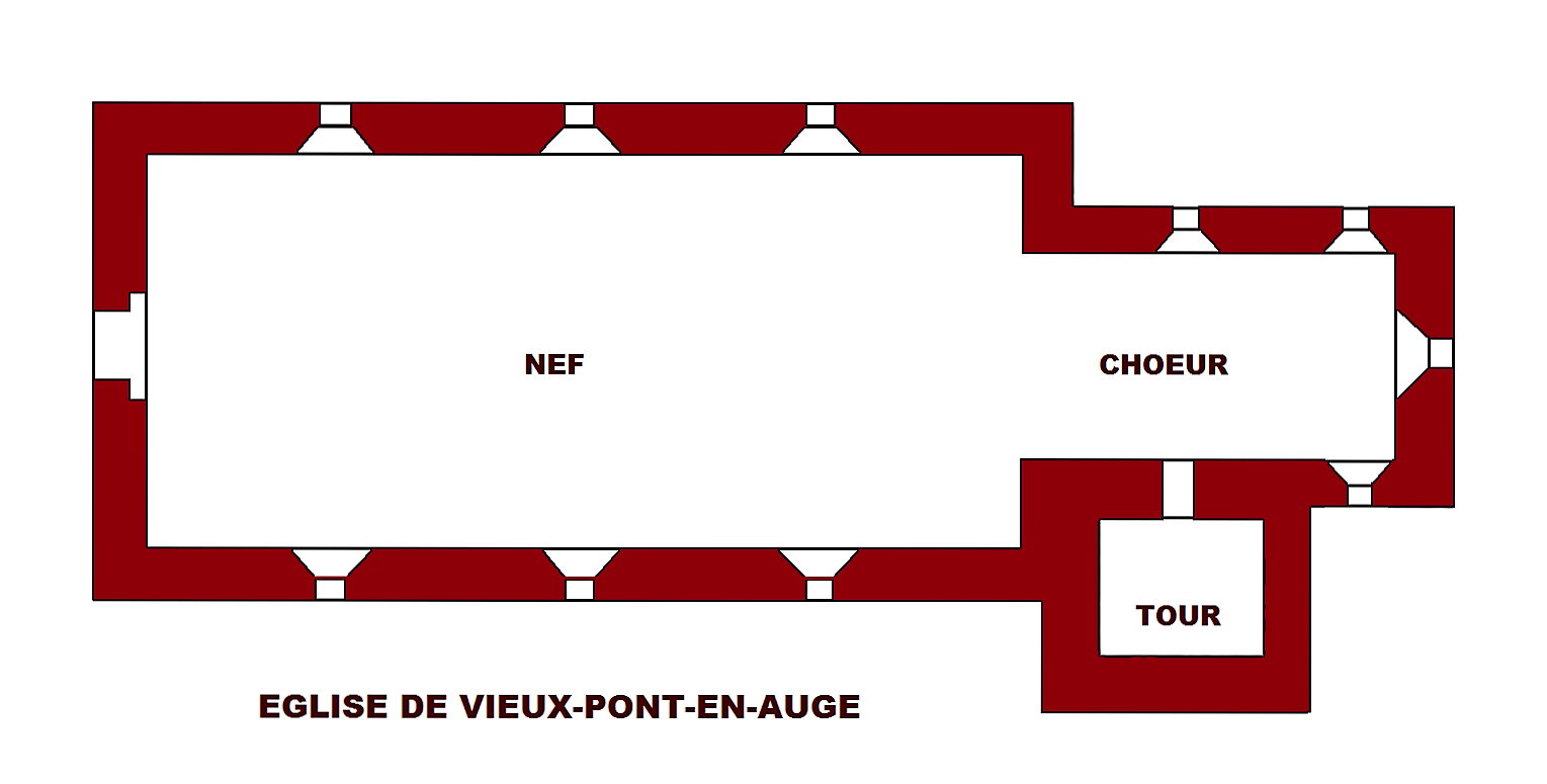 Eglise de Vieux-Pont-en-Auge, Calvados, Plan